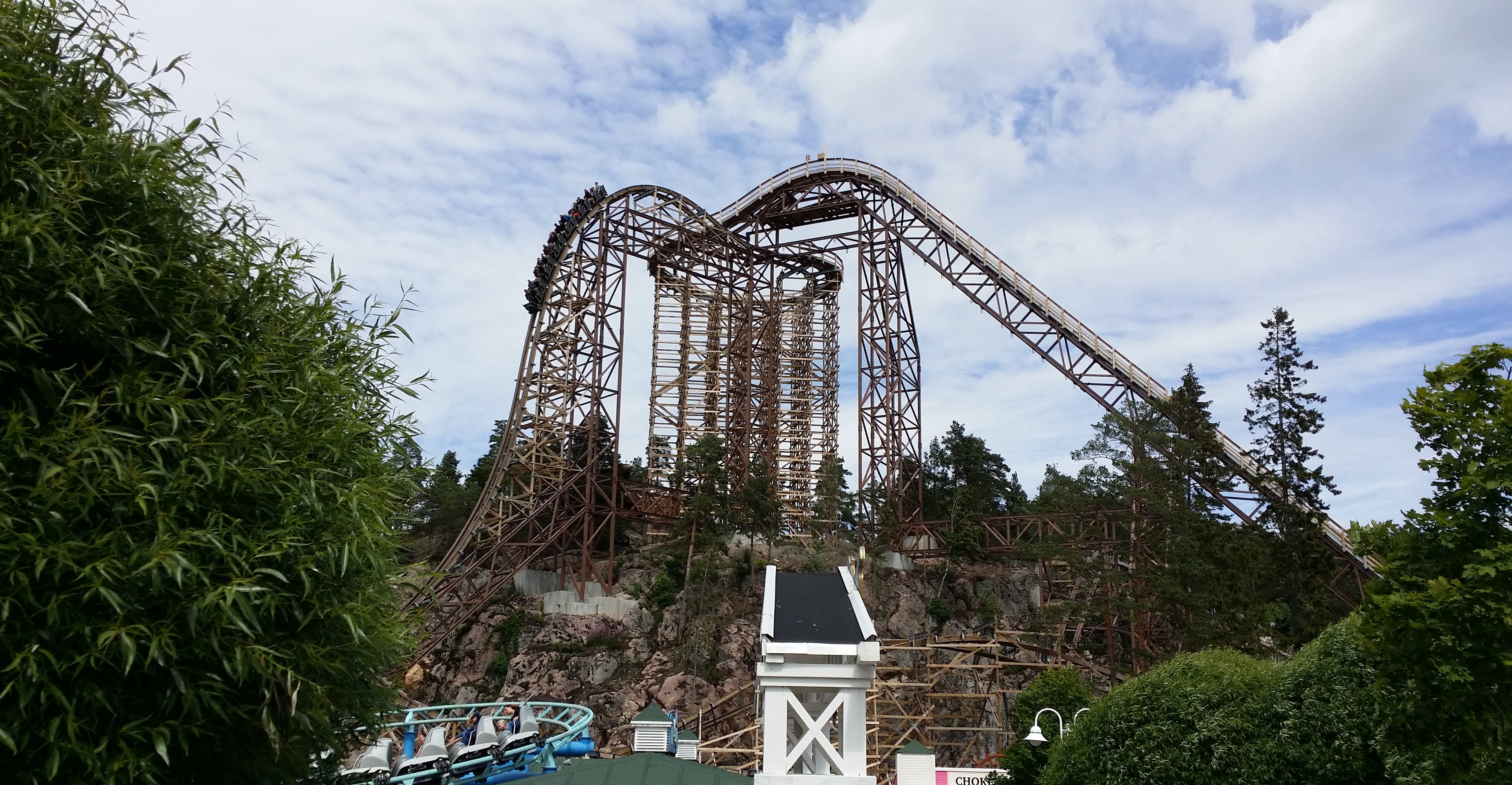 Berg- och dalbanan Wildfire på Kolmårdens djurpark.